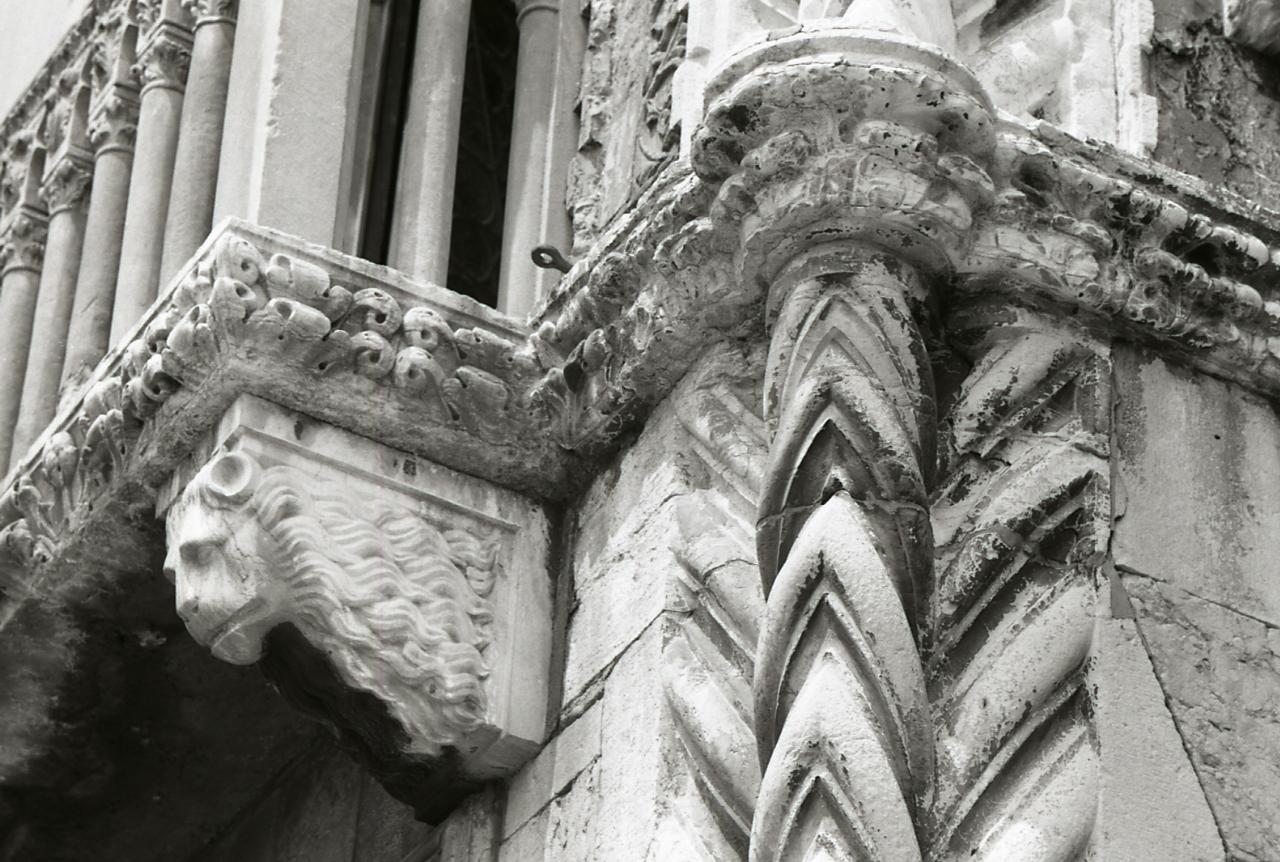 Servizio fotografico : Venezia, 1969 / Paolo Monti. - Strisce: 7, Fotogrammi complessivi: 37 : Negativo b/n, gelatina bromuro d'argento/ pellicola ; 35 mm. - ((I fotogrammi hanno una doppia numerazione. . - Sul portanegativi: Nikon FP4. - Sul dorso del portanegativi Monti specifica: "Manifesti, muri con disegni". - Probabilmente questa specifica in penna biro rossa si riferisce a ricerche personali che esulano dal contesto del servizio commissionato da Electa. - I soggetti sono elencati all'interno del portanegativi. - Occasione: Pubblicazione: "Edoardo ARSLAN, Venezia gotica: architettura civile gotica veneziana, Milano, Electa, 1970"